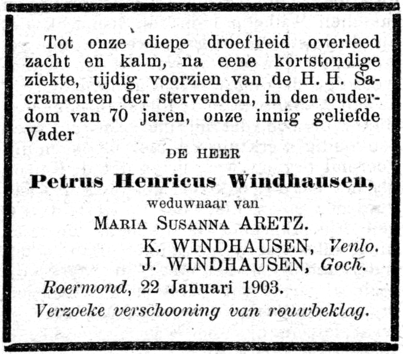 Rouwadvertentie Petrus Henricus Windhausen. Afkomstig uit de Venloosche Courant, zondag 25 januari 1903, [p. 2].